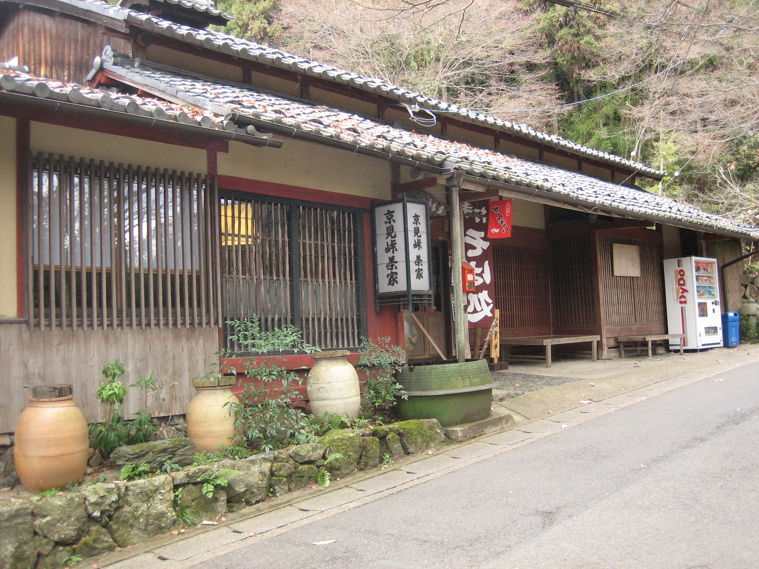 京見峠に建つ茶屋を撮影